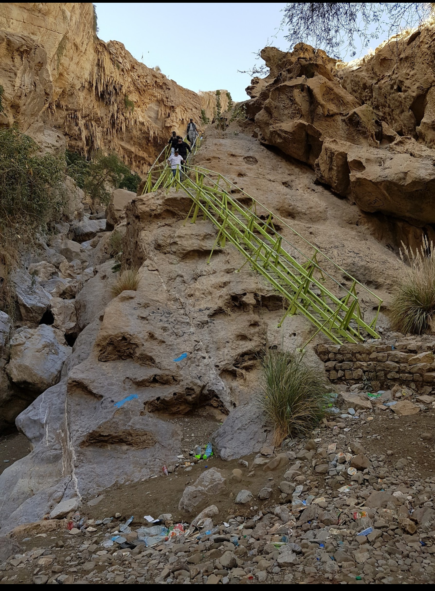 لاہوت لامکاں سے زائرین آتے ہوئے